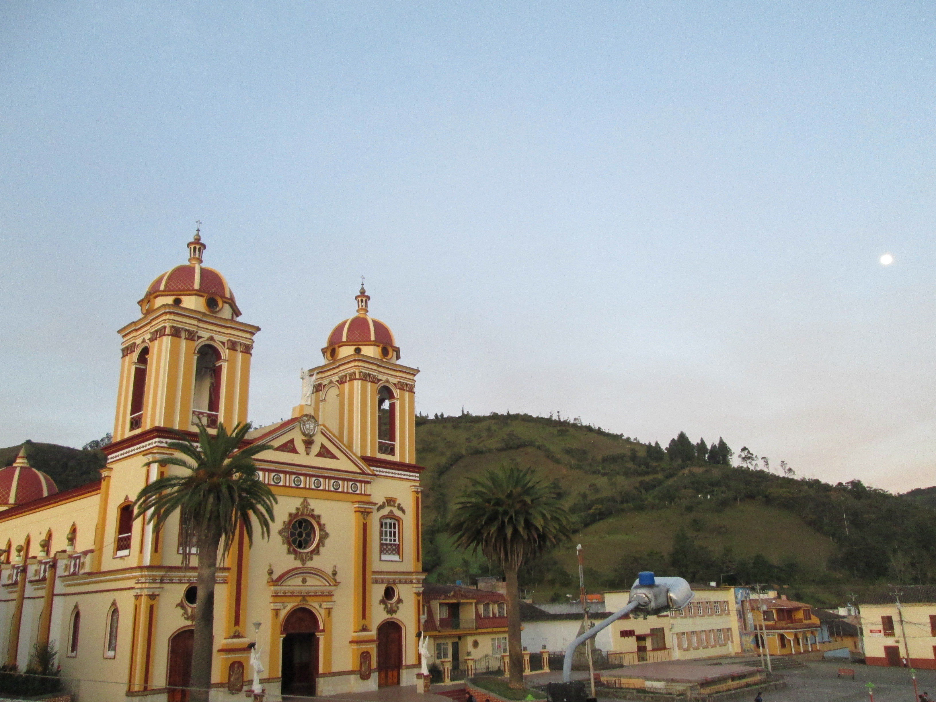 Iglesia y parque